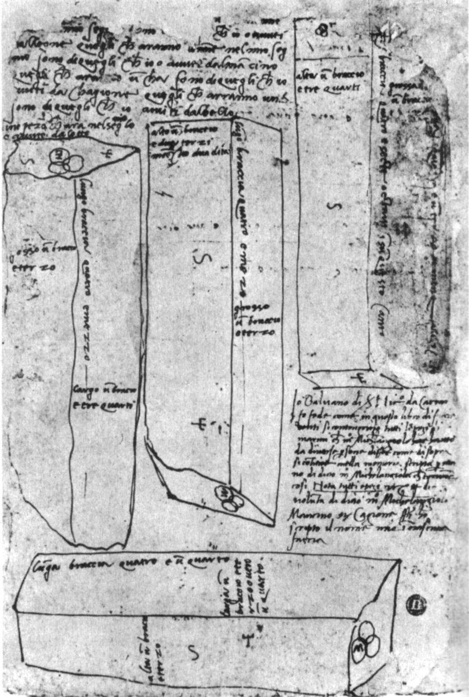 Michelangelo, schizzo esplicativo per cavatori con blocchi e misure, casa buonarroti